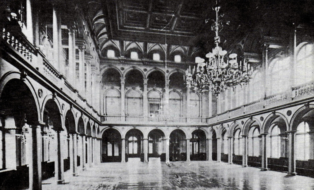 Der Innenraum der Börse in Königsberg